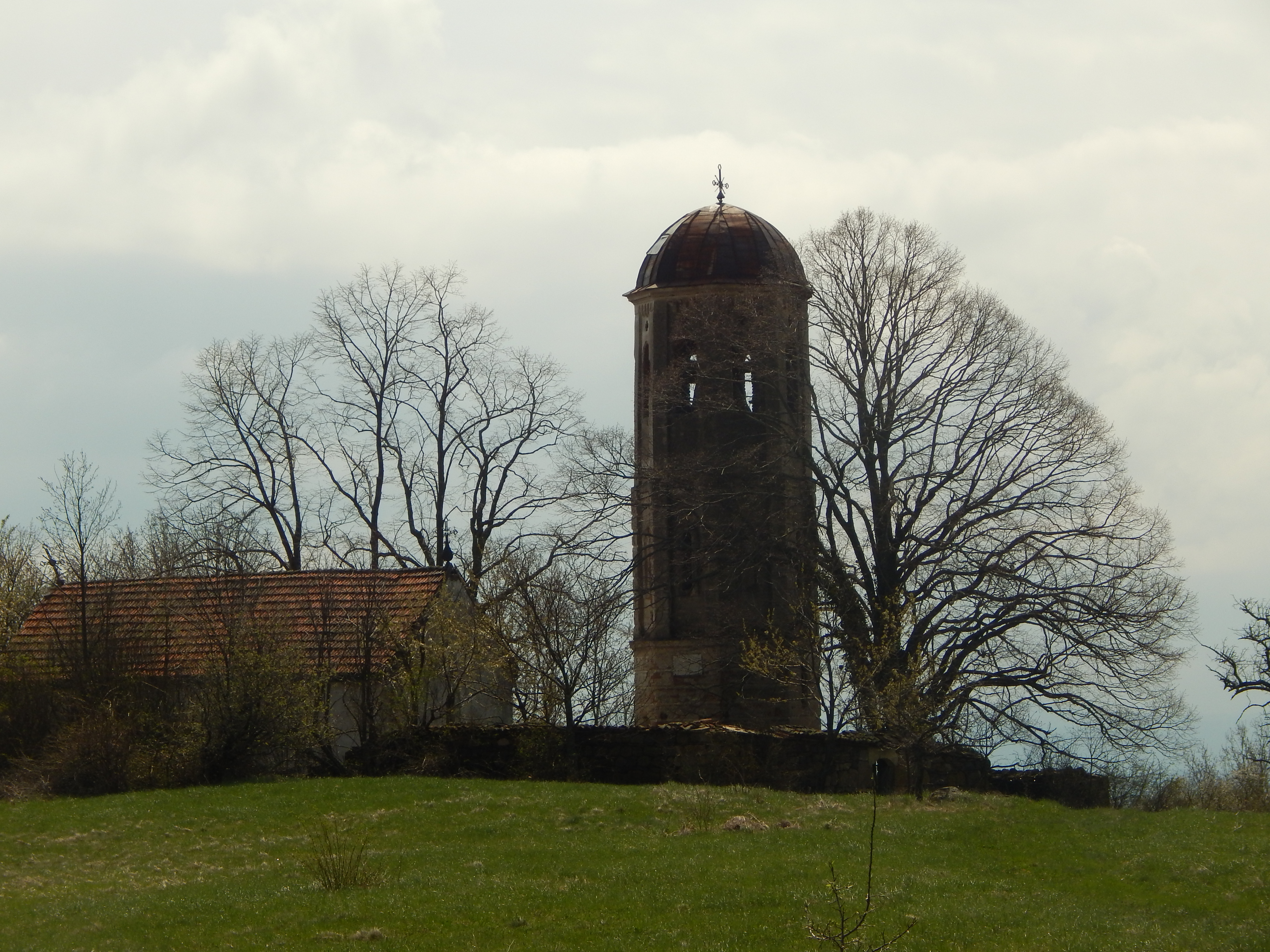 Предео изузетних одлика Радан Ово је фотографија заштићеног природног добра у Србији под шифром: ПИО24 This is a a photo of a natural area in Serbia with ID: ПИО24